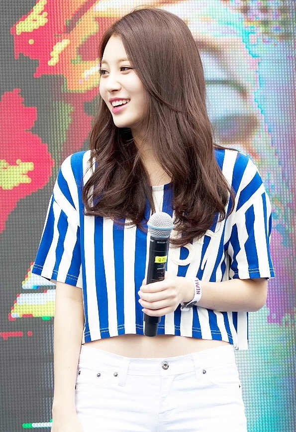 140705 김해 워터파크 미니콘서트